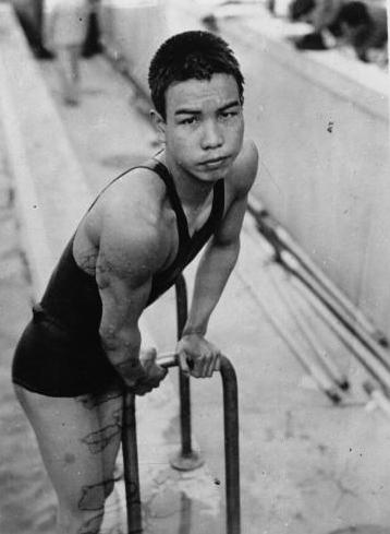 小池禮三。1932年 ロサンゼルスオリンピック銀メダリスト。1936年 ベルリンオリンピック銅メダリスト。